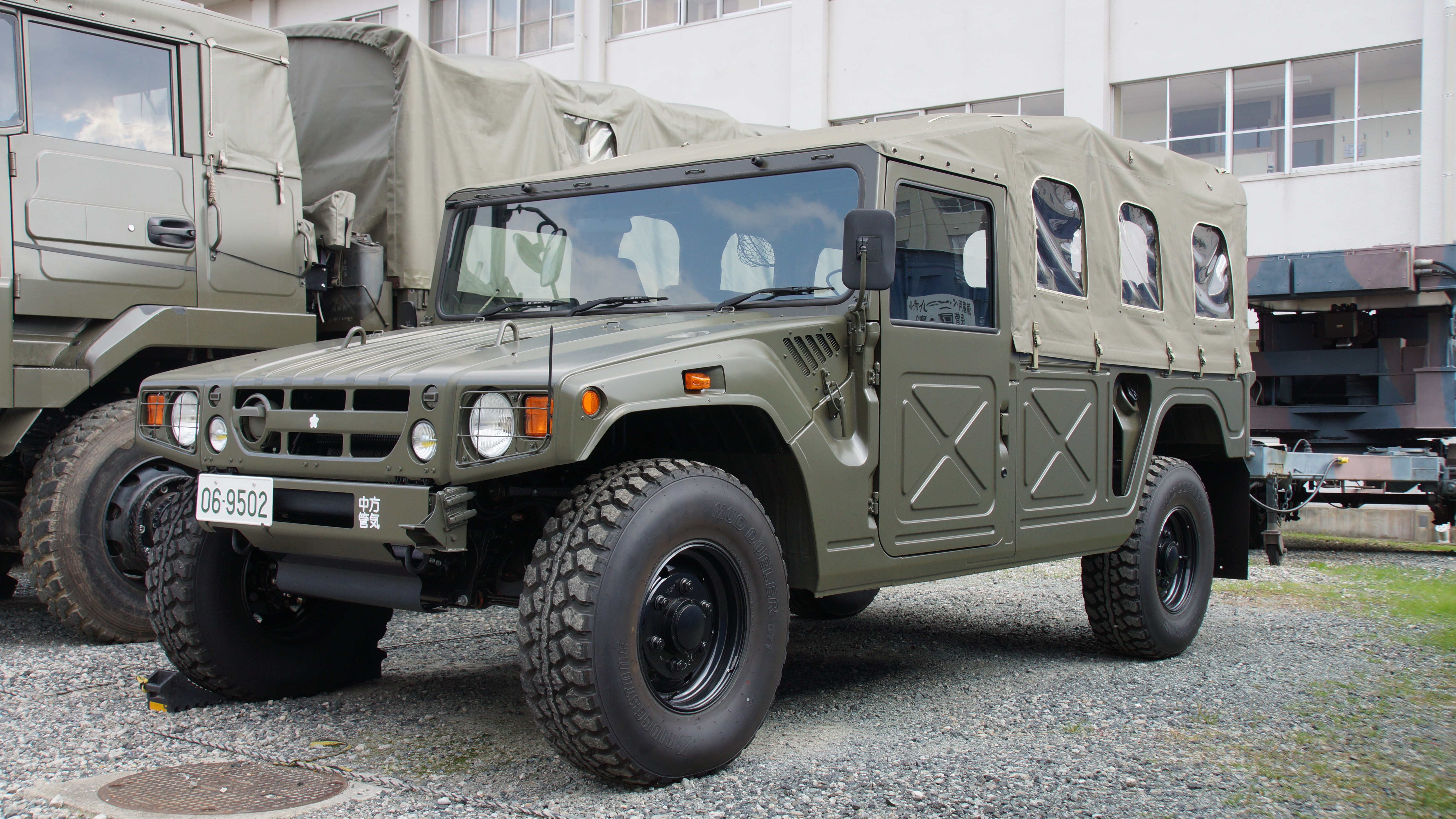 陸上自衛隊 高機動車（06-9502号車） 左前面。2017年11月4日 明野駐屯地にて。